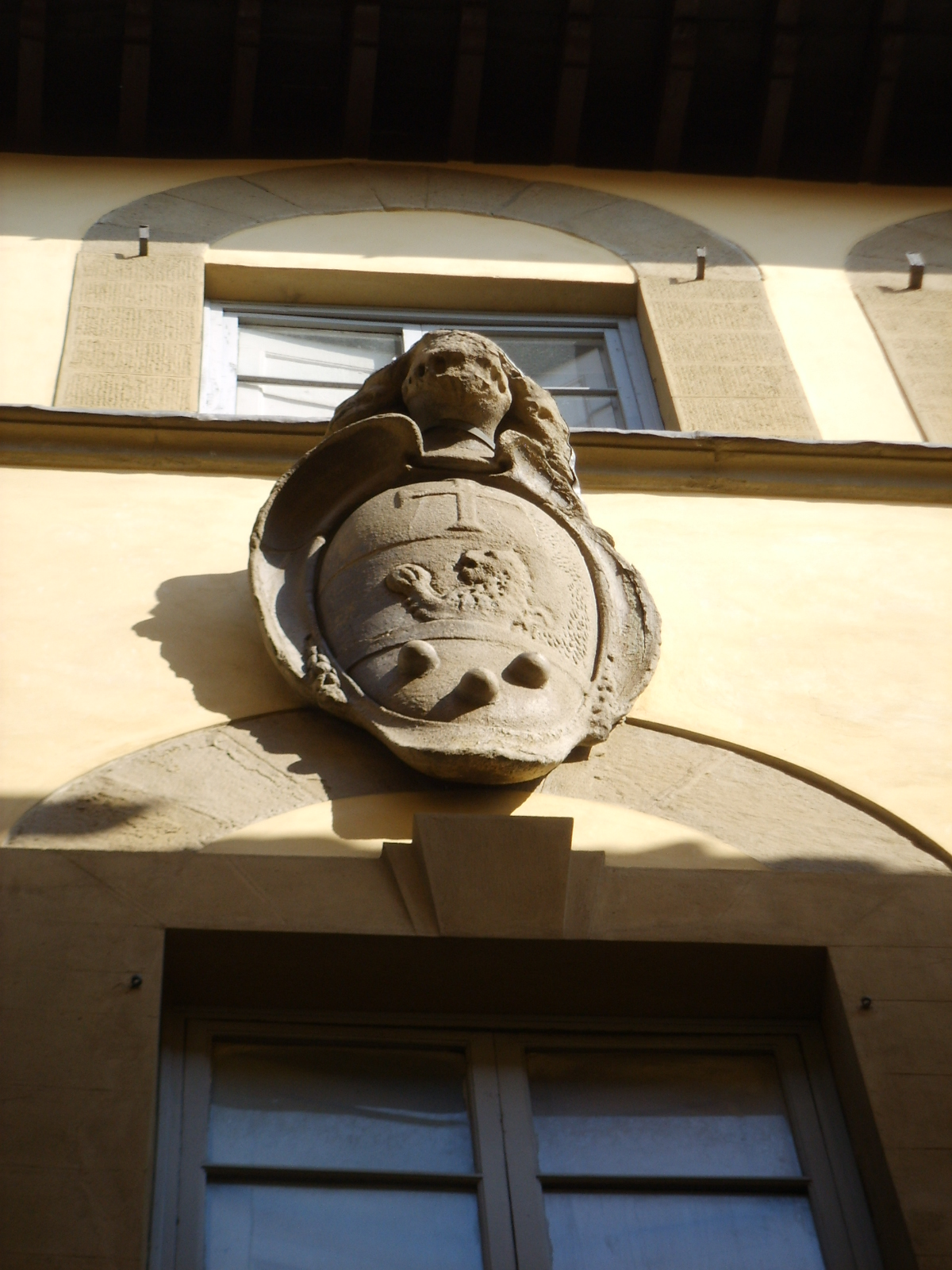 stemma personale di Giambologna, Palazzo_del Giambologna in Florence